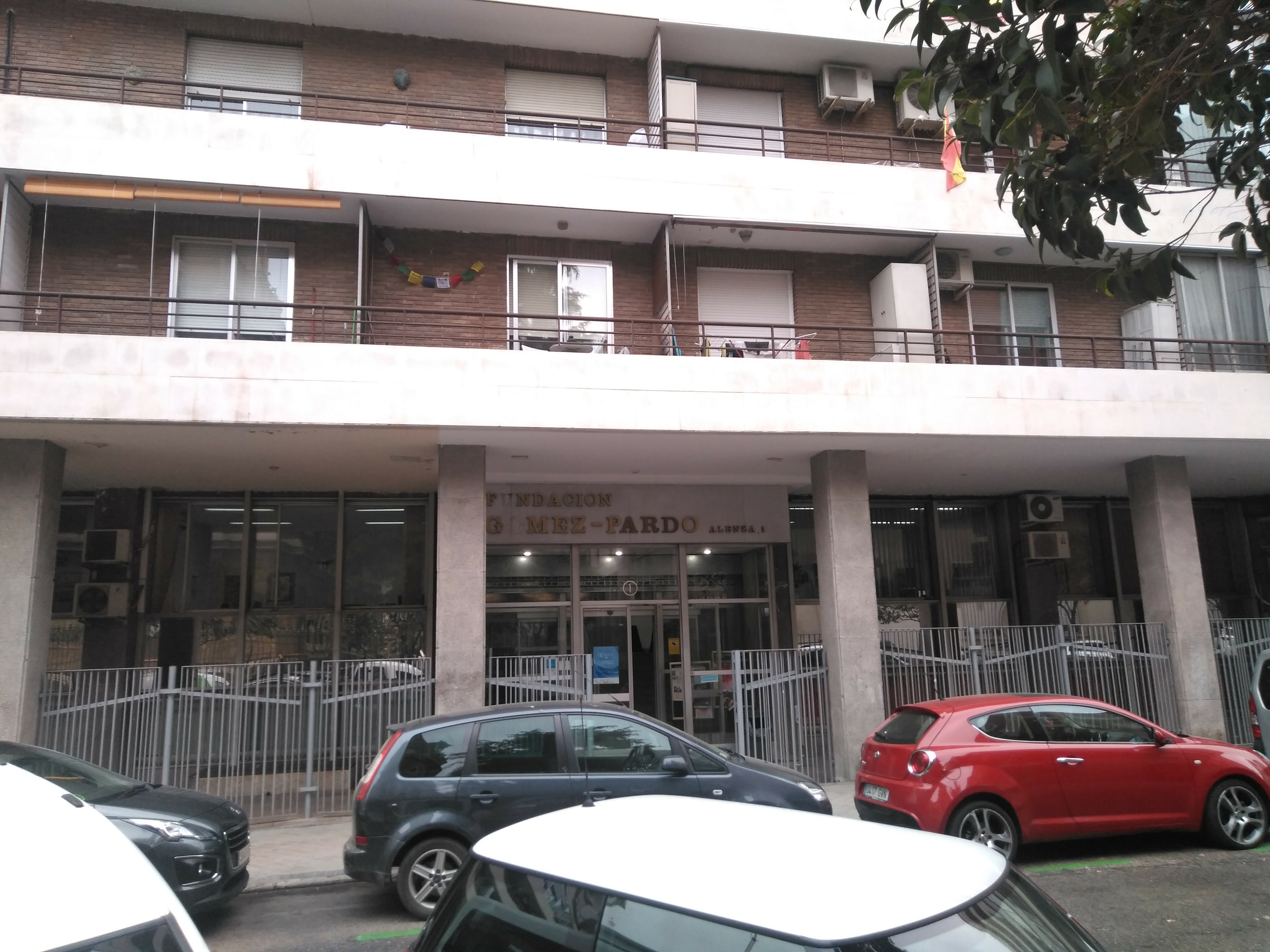 Fundación Gómez Pardo, Madrid (España)